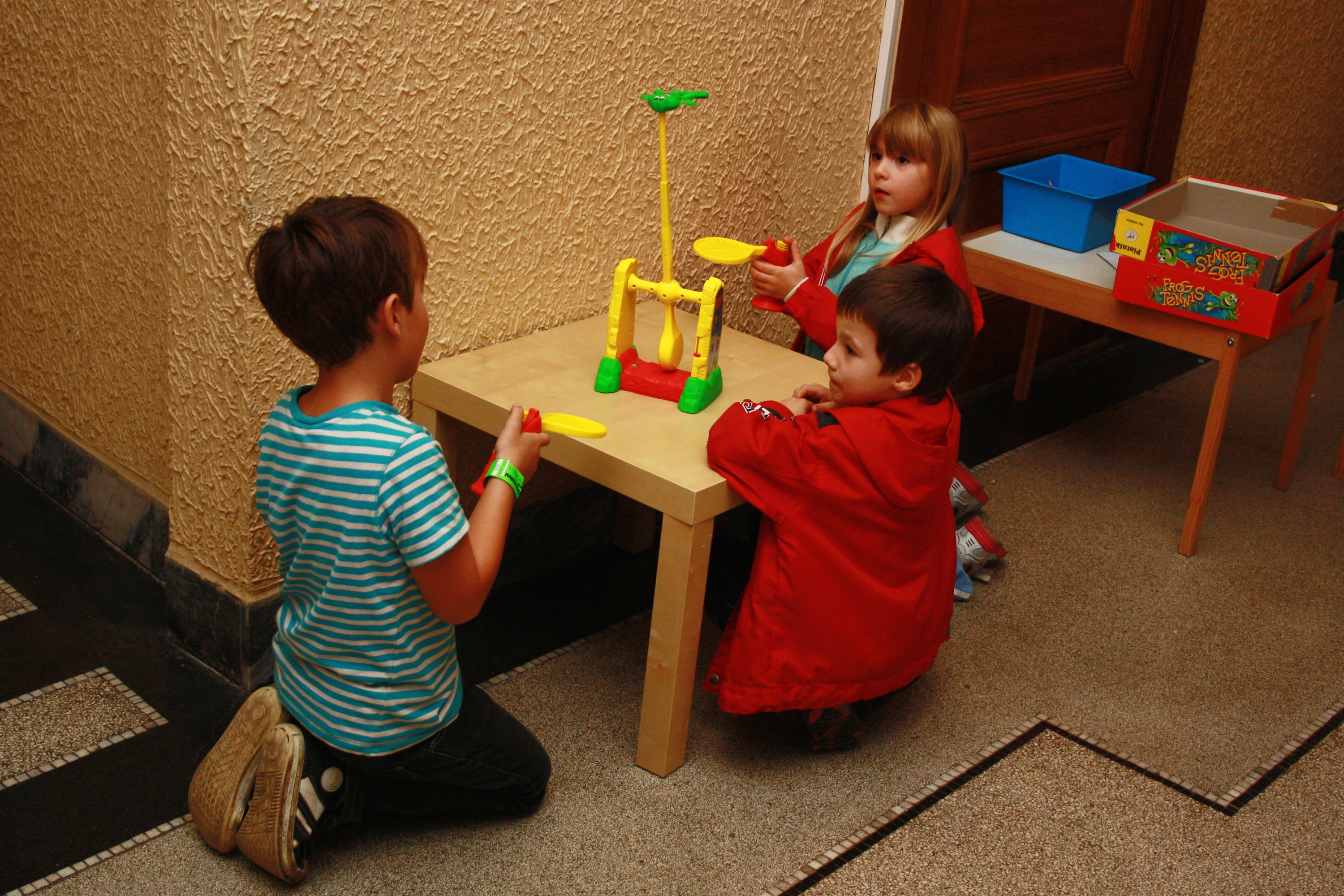 Deskohraní 2012 - Frog tennis